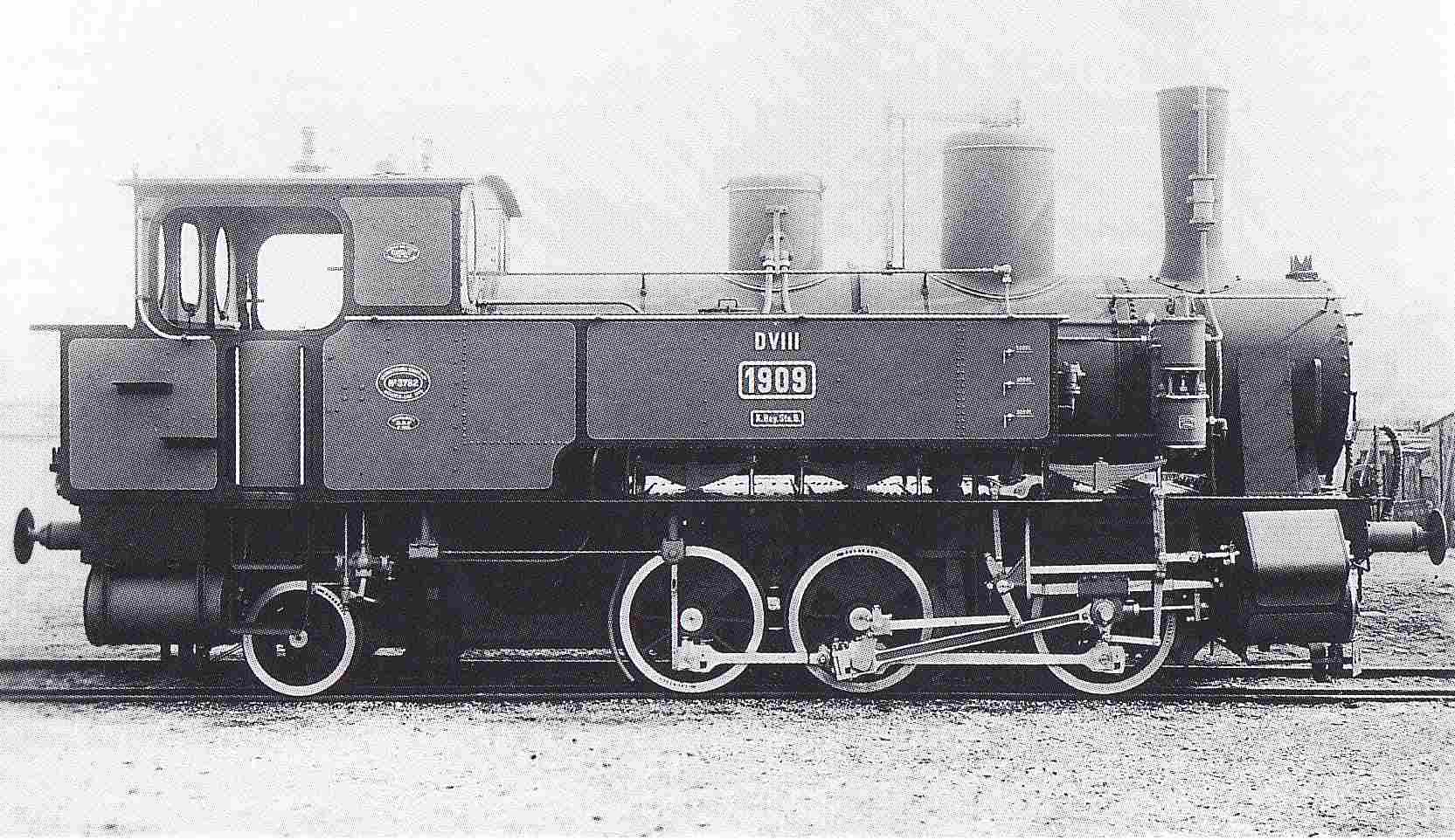 Nassdampflokomotive D VIII 1909 der Königlich Bayerischen Staatseisenbahnen im Ablieferungszustand 1898 bei Krauss&Co. in München.